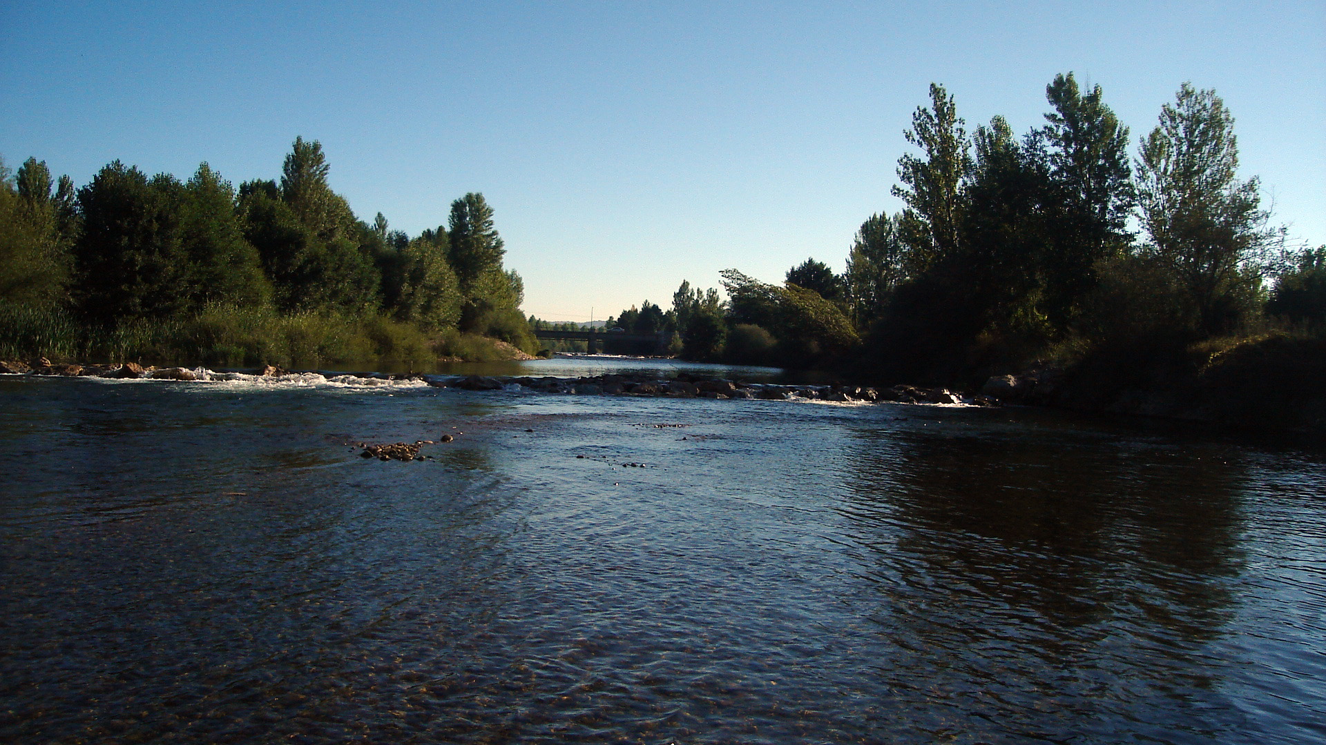 Rio Orbigo